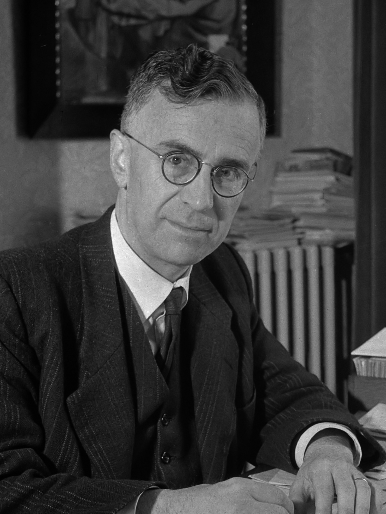 Ds. Jan Buskes 1945